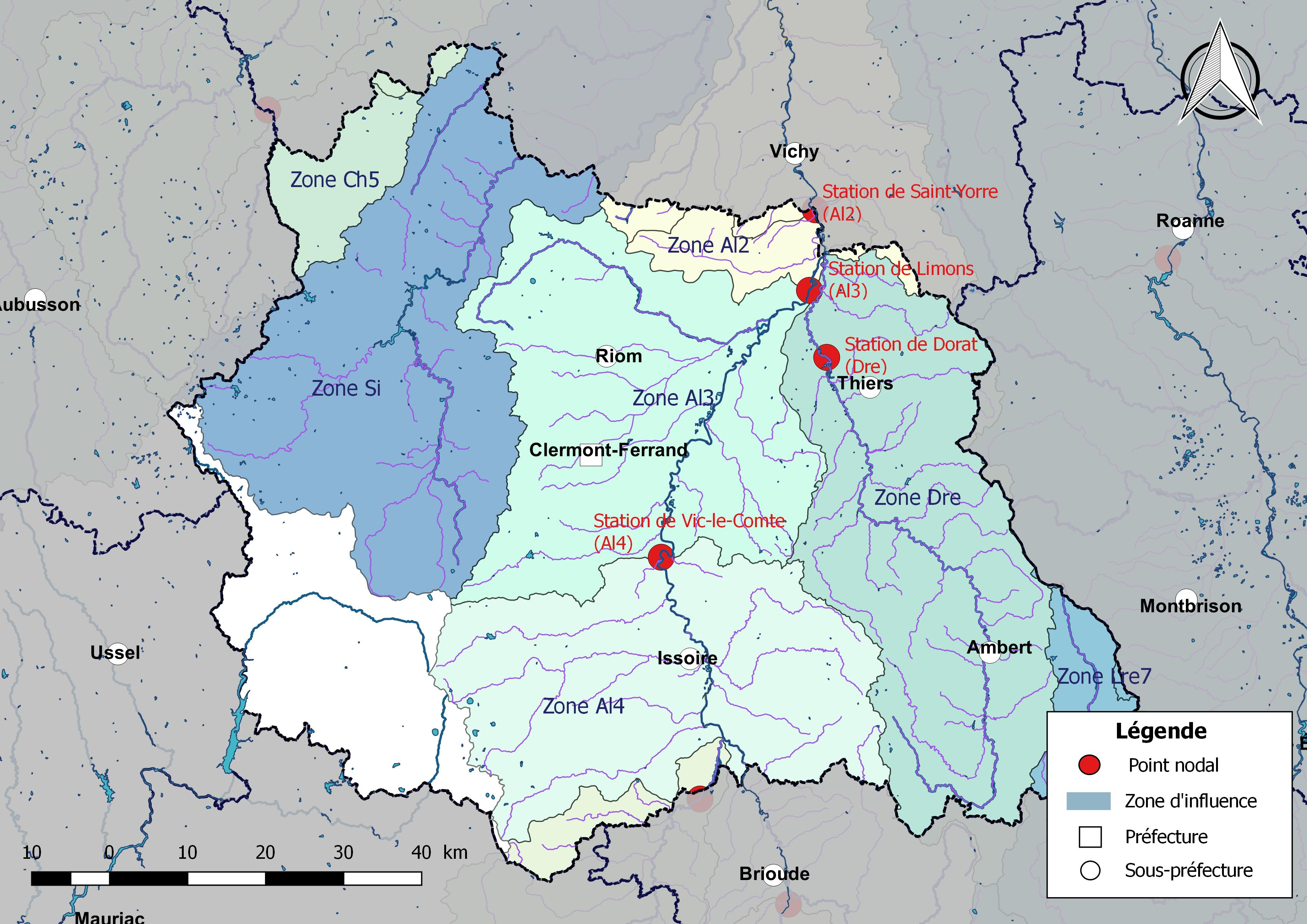 Carte des zones d'influence des points nodaux dont dépend le département du Puy-de-Dôme (France).